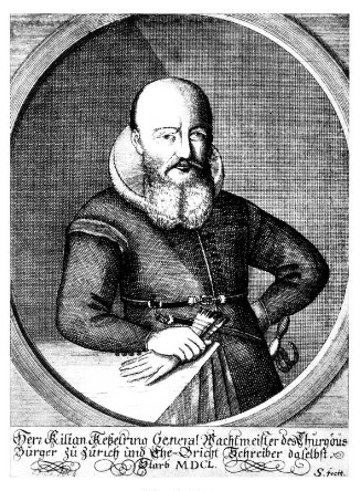 Kilian Kesselring (1583–1650) Generalwachtmeister der Landgrafschaft Thurgau, Ehegerichtsschreiber